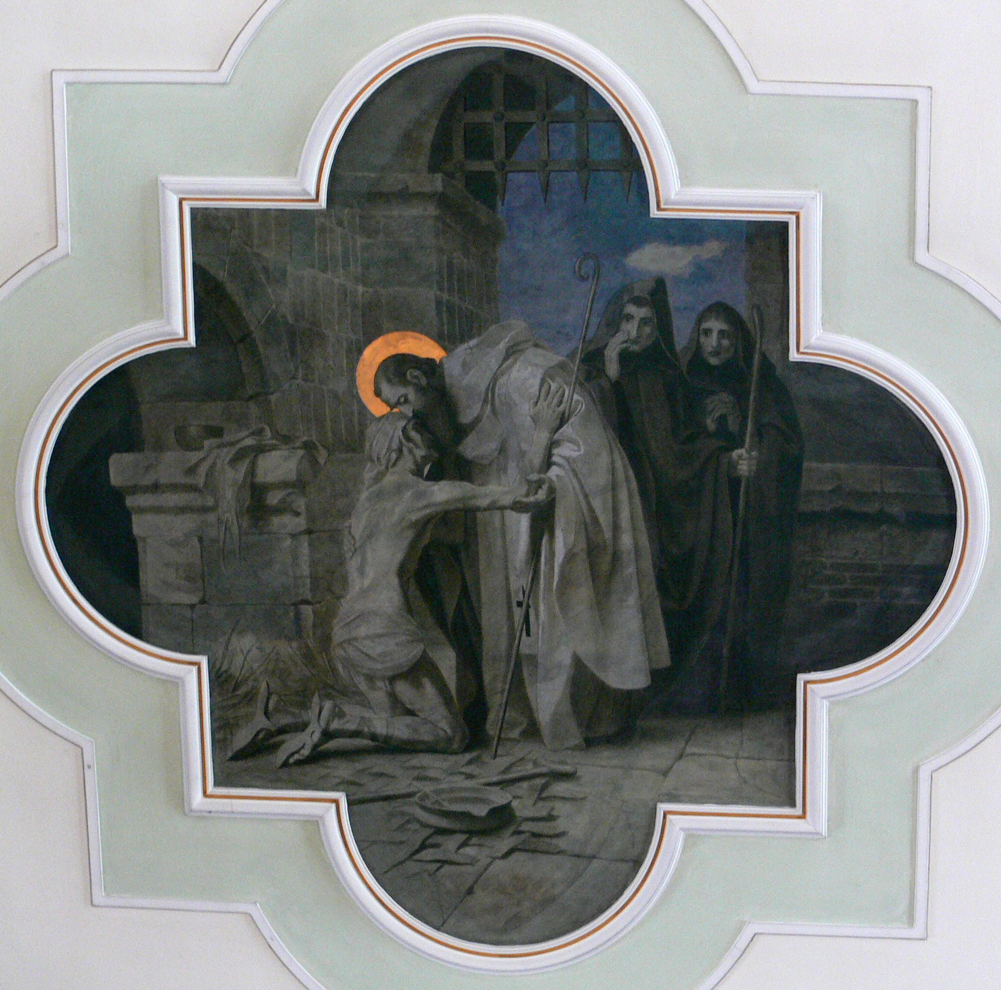 Stadtpfarrkirche St. Martinus, Wangen im Allgäu Gebhard Fugel: Szene aus der Martinslegende (Deckengemälde, 1900)